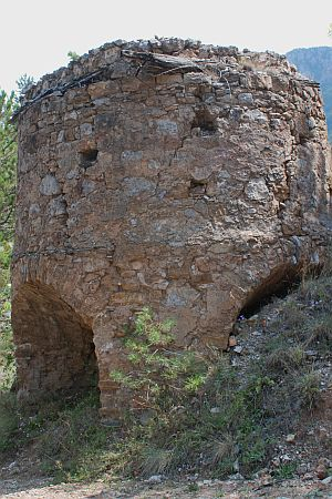 Alter Erz-Röstofen bei Saint-Laurent-le-Minier